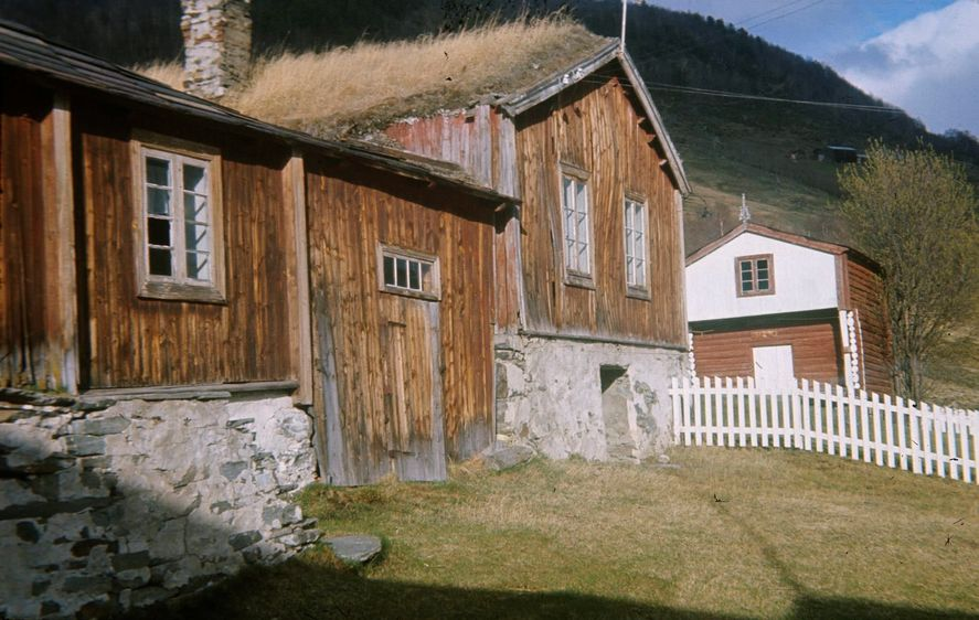 Dovre (Skjelstad) prestegård. Foto: Ola Øgar Svendsen. Fra Riksantikvarens Kulturminnesøk.